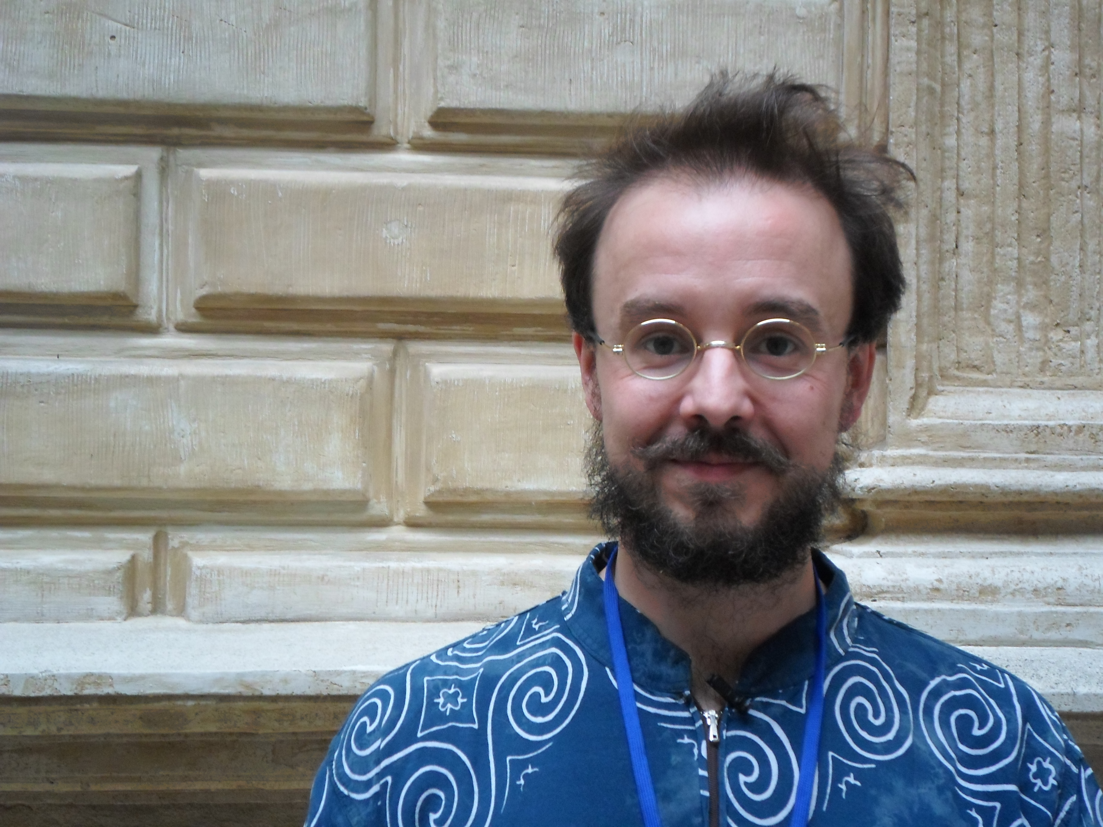 El músico y compositor, durante las jornadas TIC'15 realizadas el 3 de junio en Valladolid, España